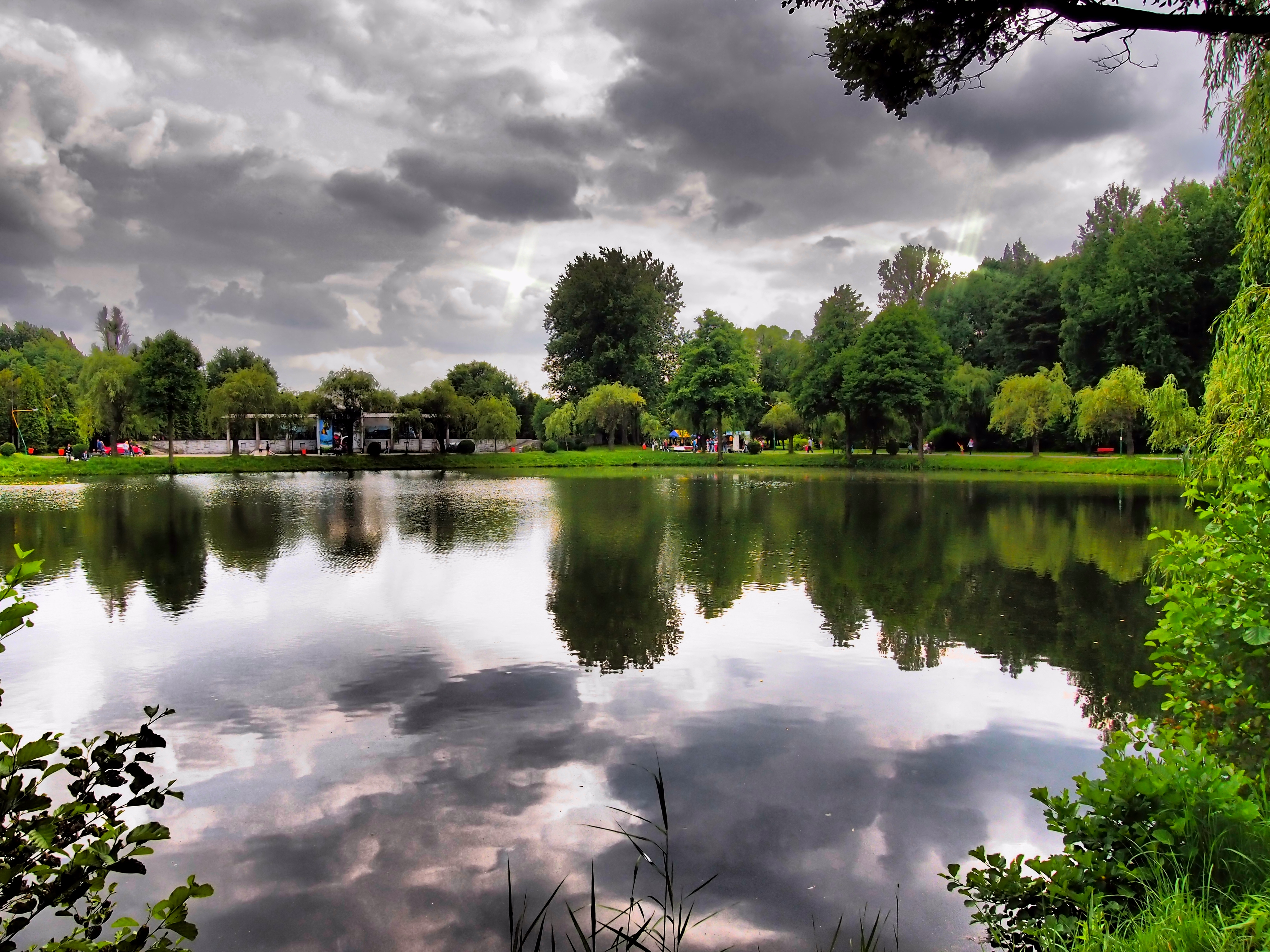 Staw w parku w Kazimierzu Górniczym.